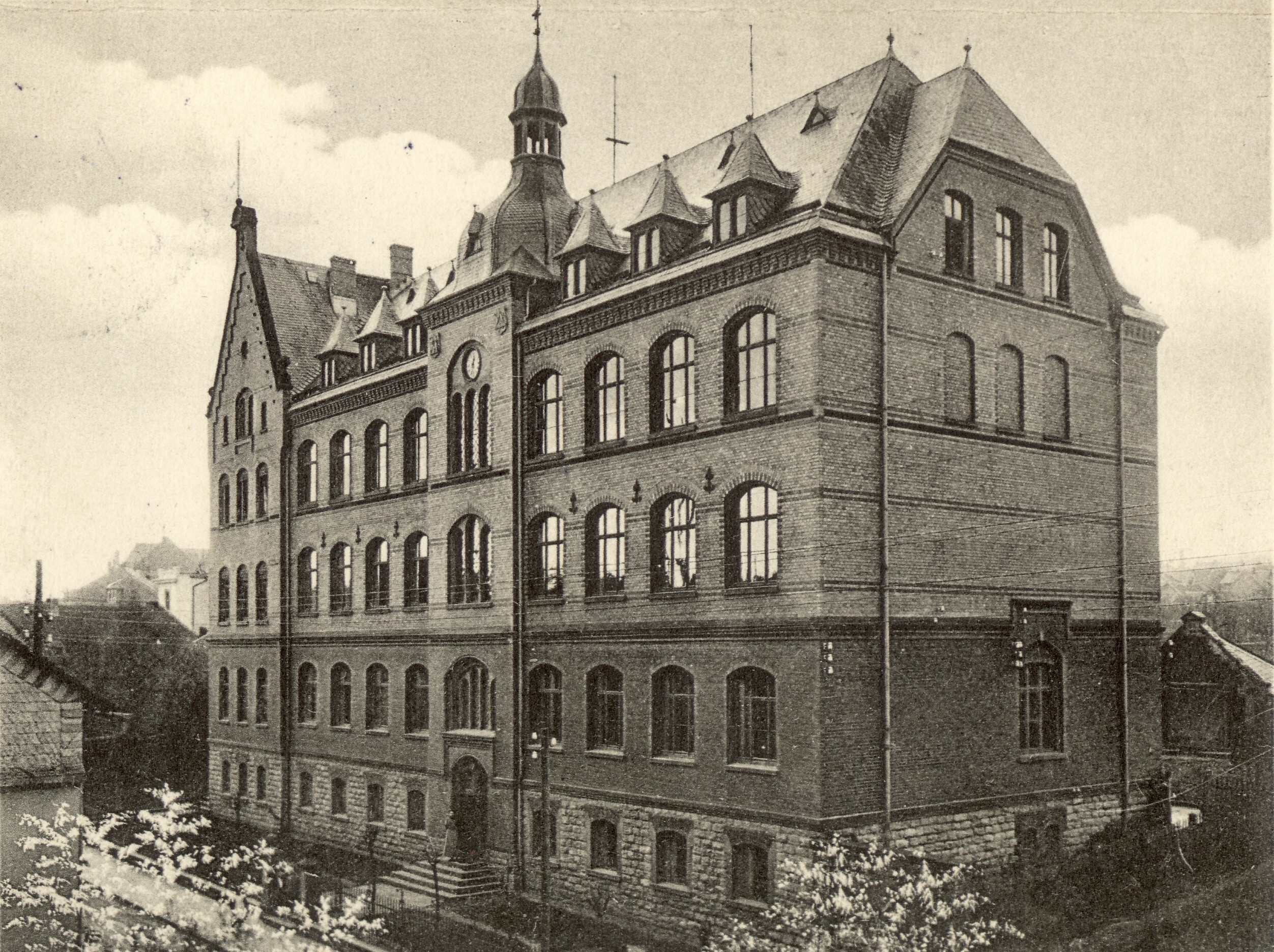 Idstein, Limburger Straße 2, Königliche Baugewerkschule